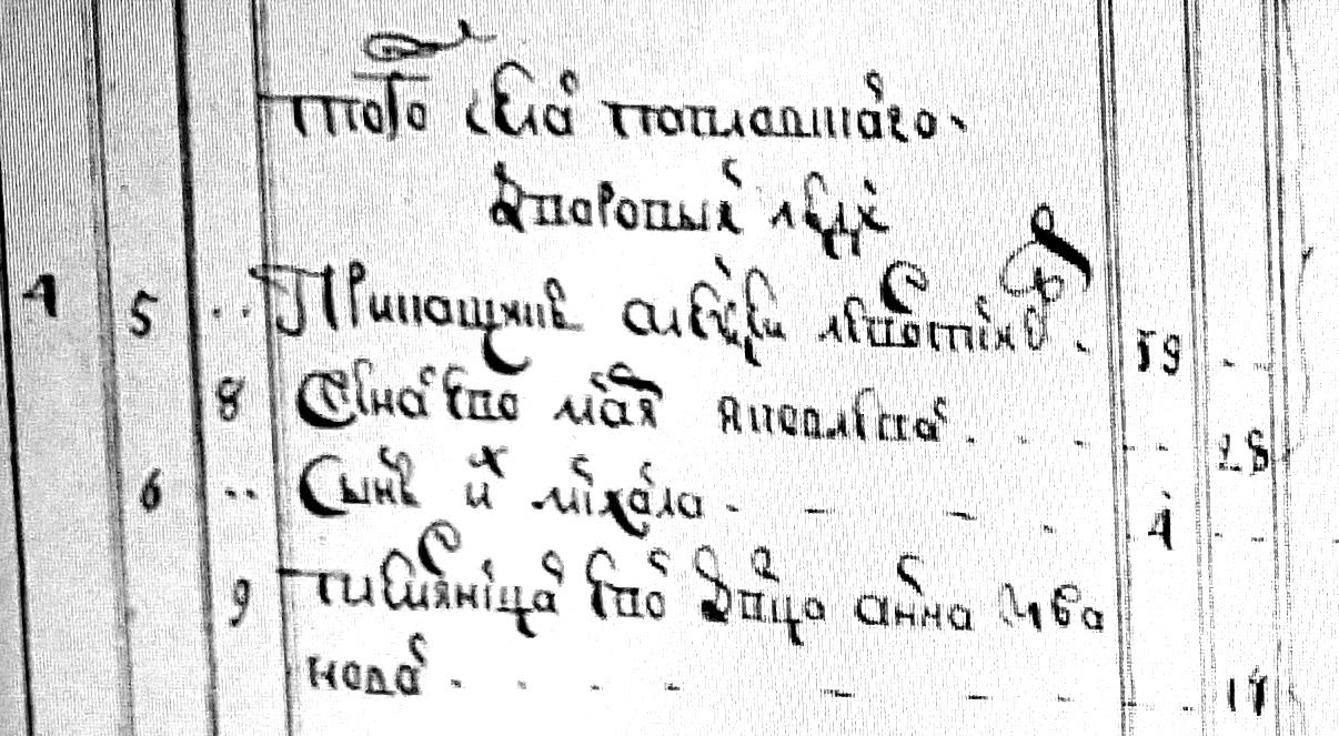 Семья Матинских в исповедной ведомости Благовещенской церкви села Павловского за 1753 год